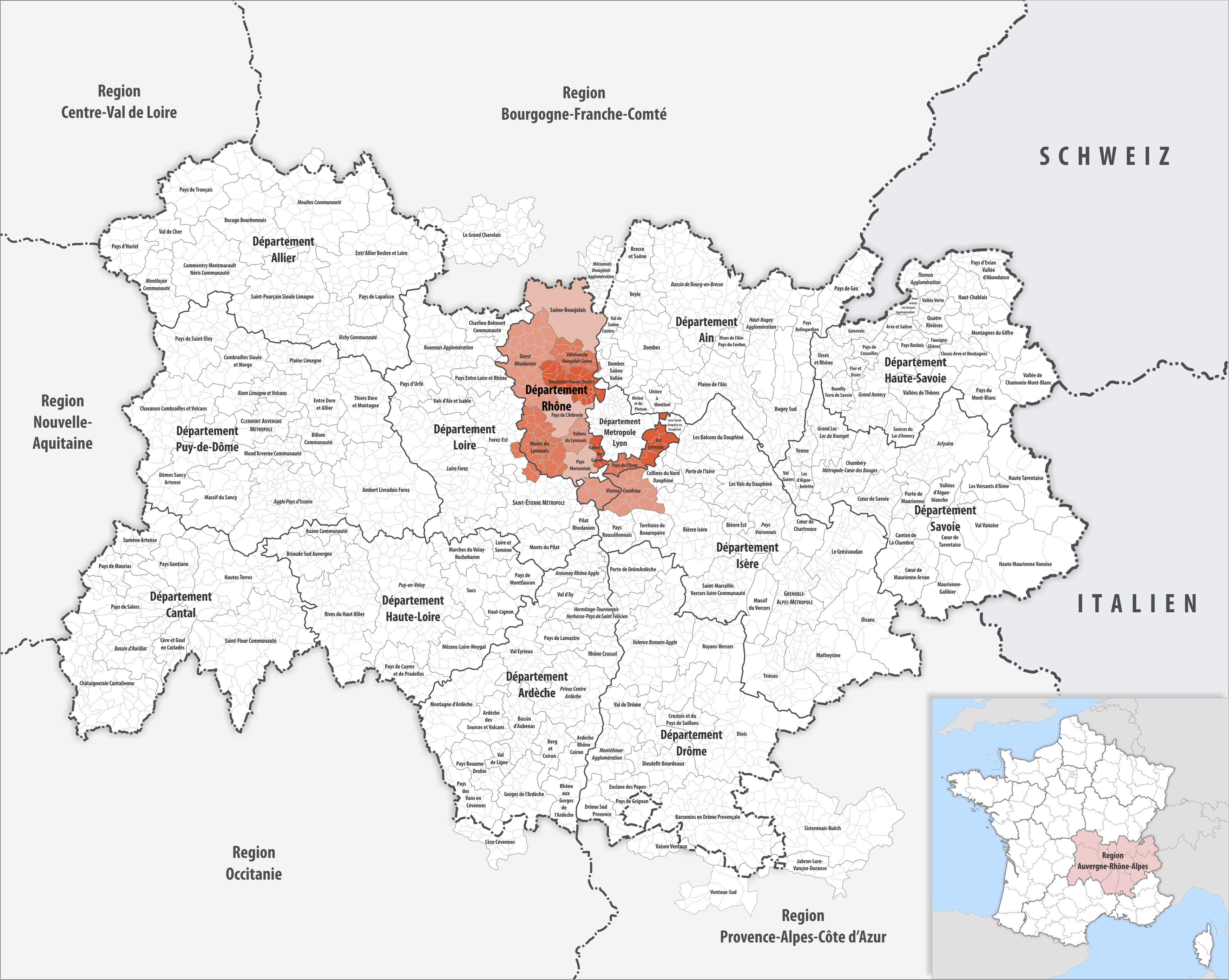 Gemeindeverbände im Département Rhône